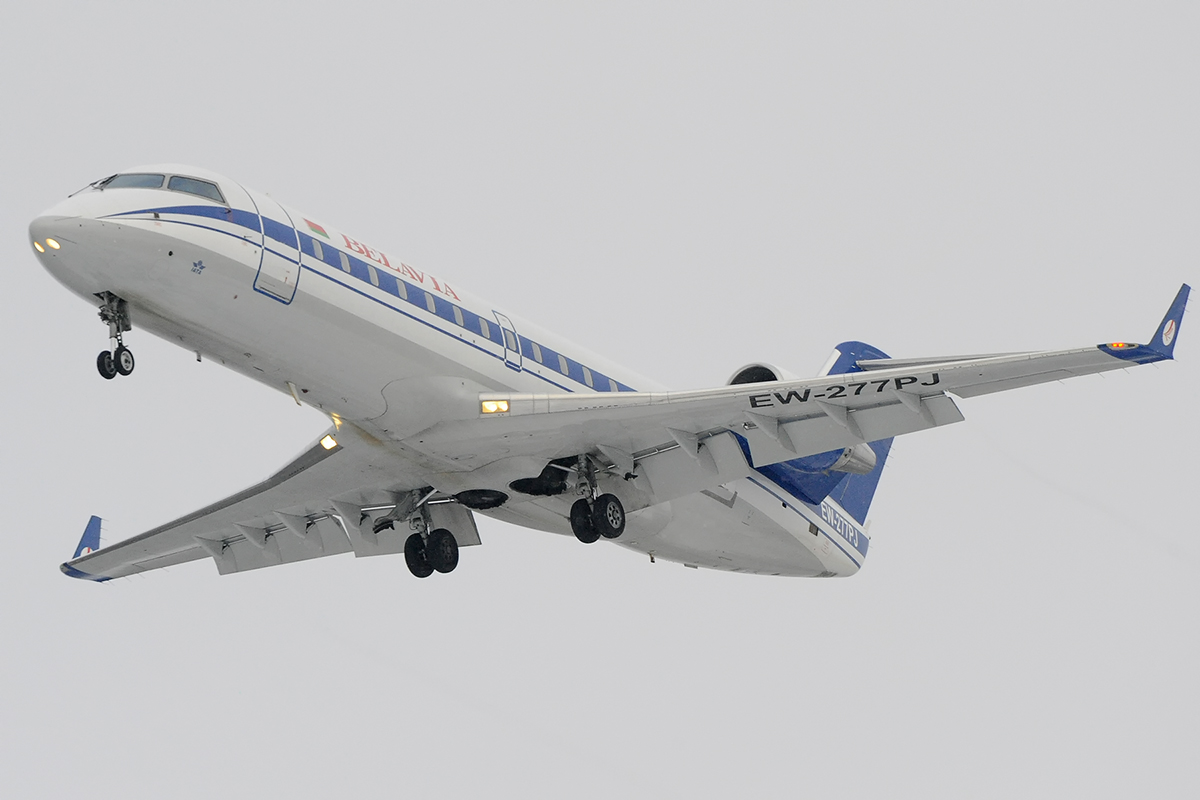 Belavia Canadair CL-600-2B19 Regional Jet CRJ-200ER EW-277PJ